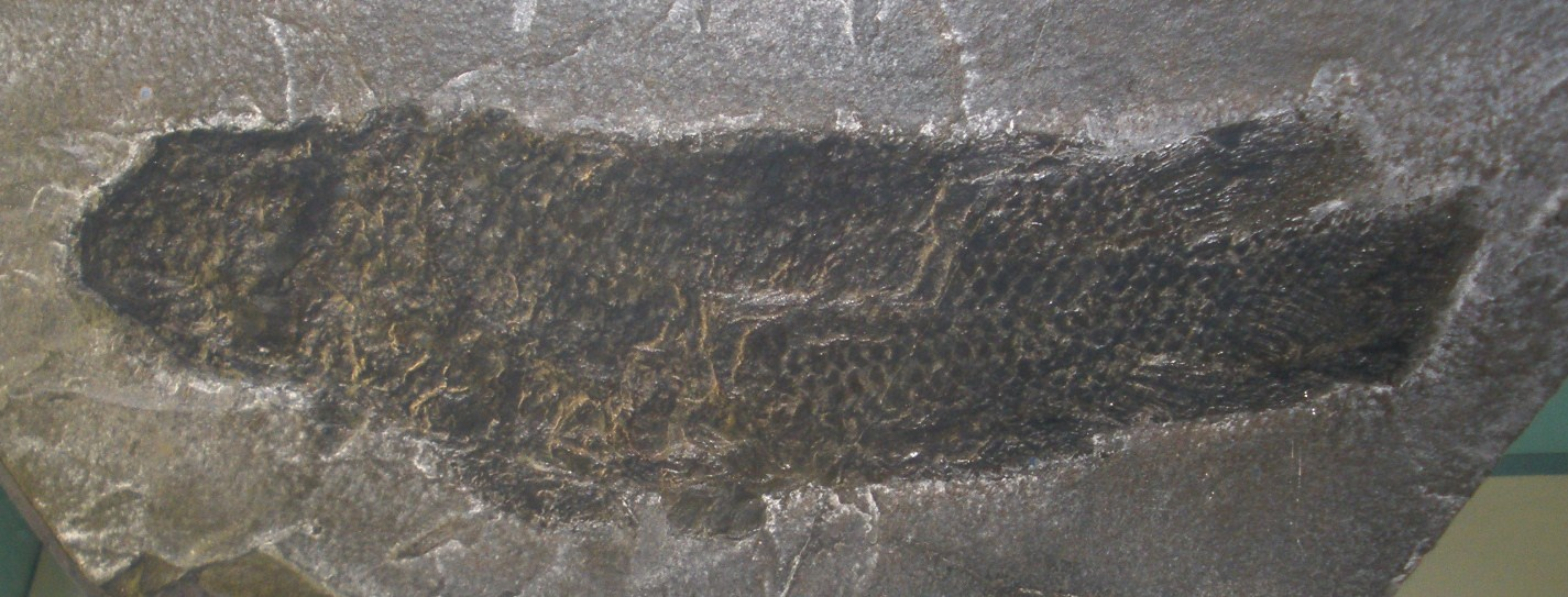 Fossil of Dipterus, an extinct lungfish- Took the photo at Sanckenberg Museum of Frankfurt